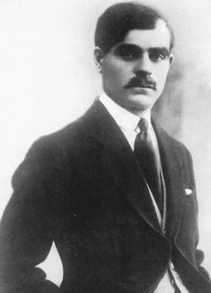 Huseyngulu Sarabski